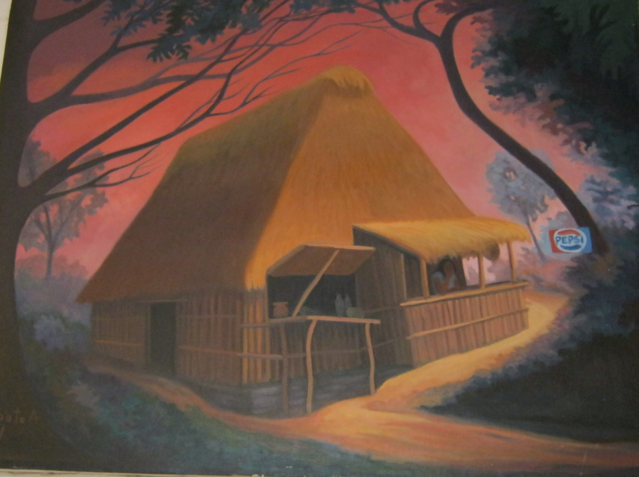 tienda en el camino pintado en 1981